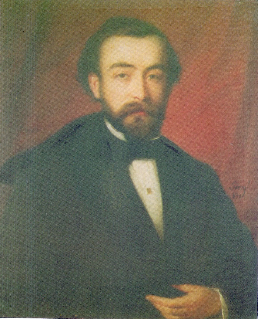 Giergl Henrik portré.